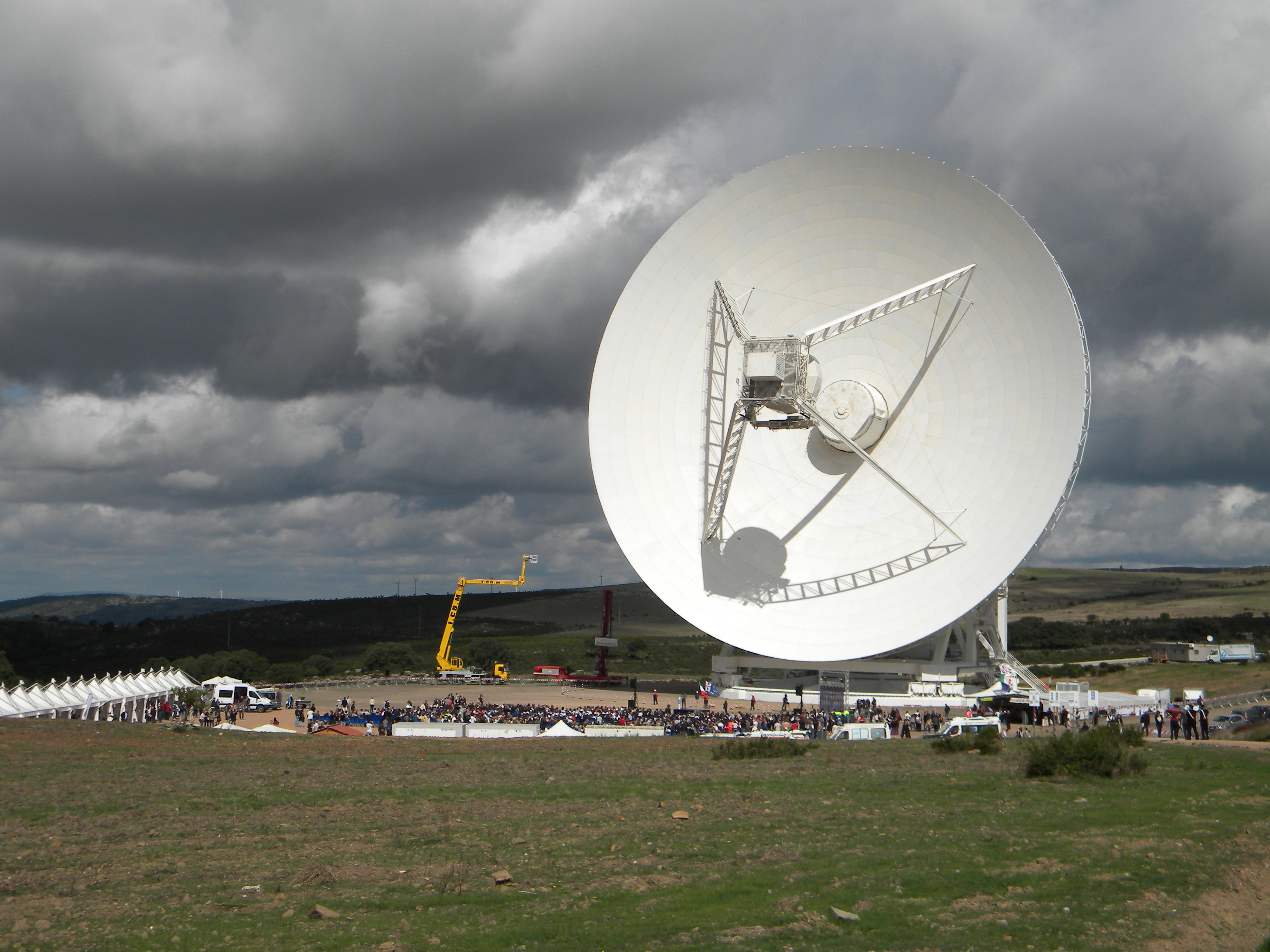 Il Sardinia Radio Telescope orientato verso l'orizzonte, fotografato il giorno della sua innaugurazione.